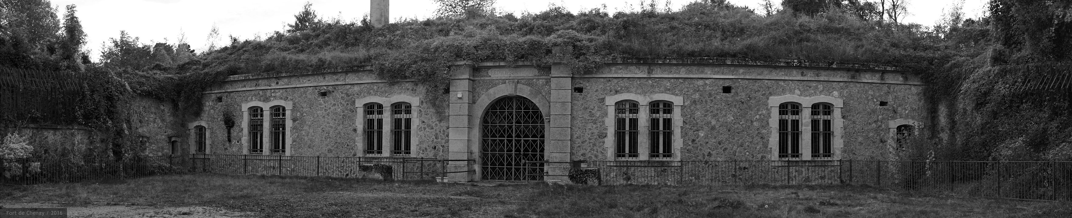 Toutes les grilles sont d'origine.